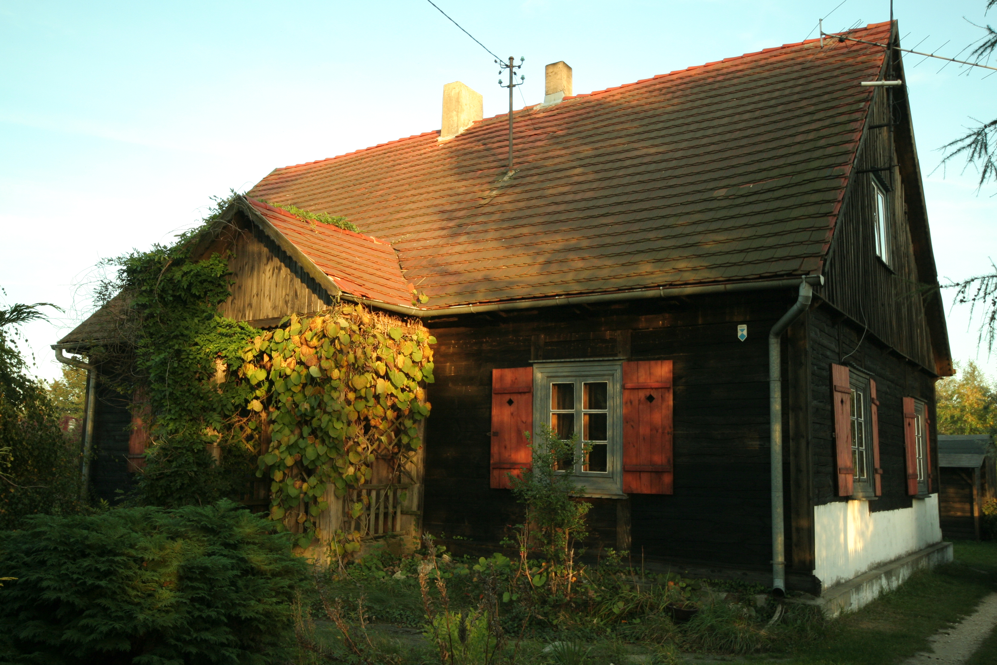 Dom drewniany zwany "starą szkołą", pierwotnie leśniczówka Natolin 33, Lipie 12.2011.